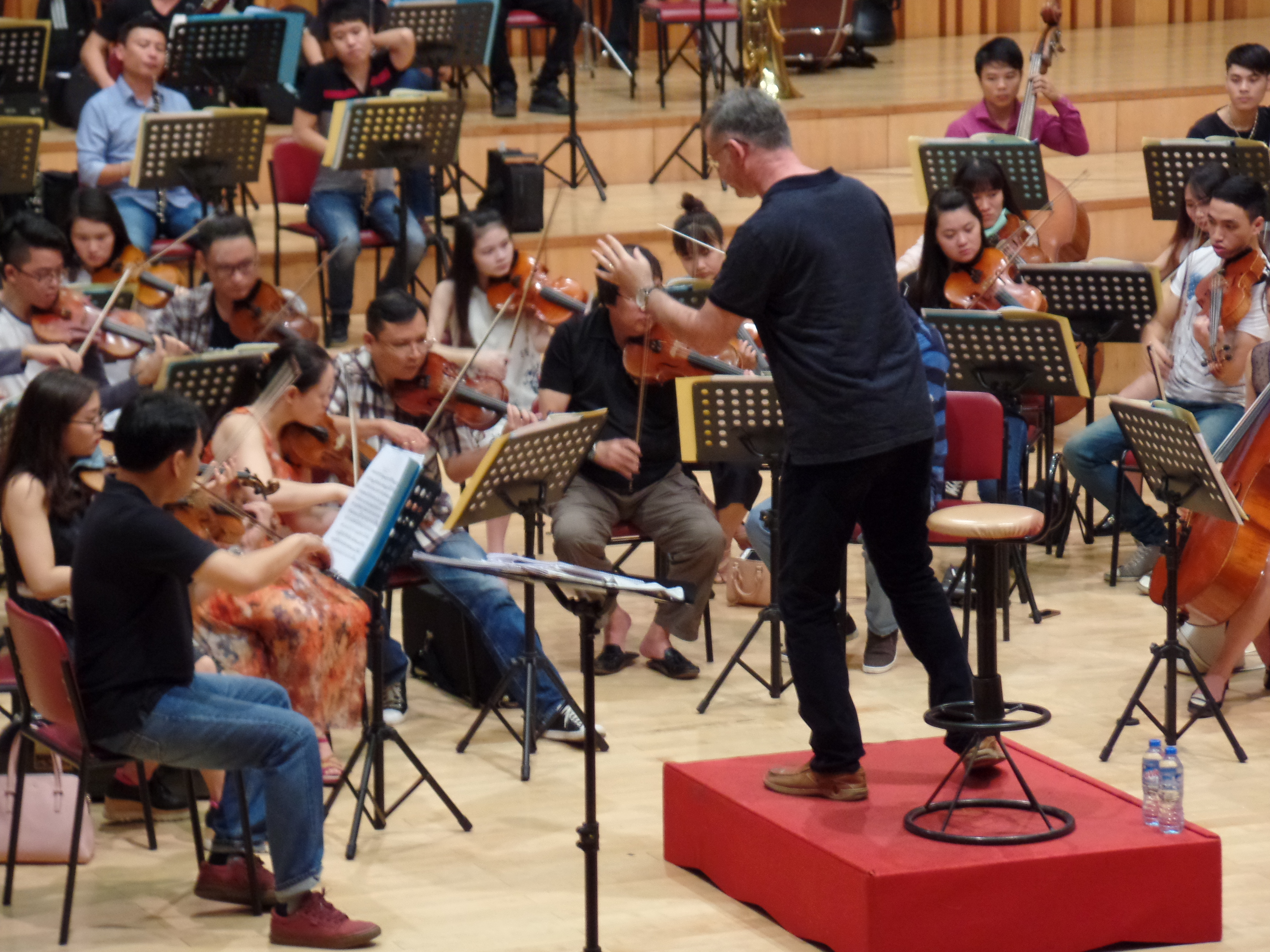 המנצח שלו עד-אל בחזרה עם התזמורת הפילהרמונית של האנוי